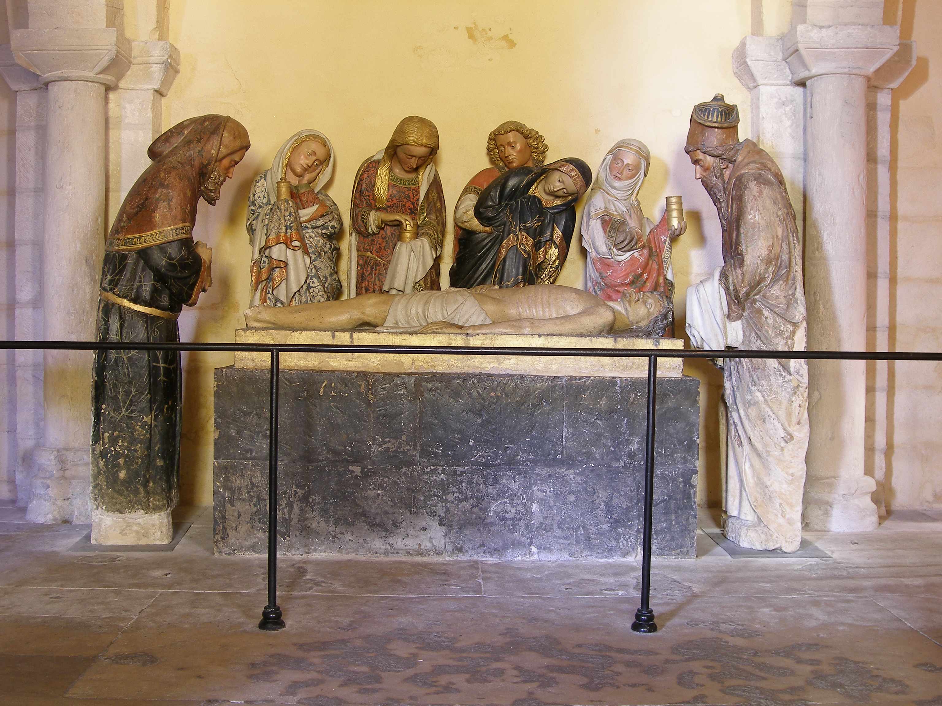 Dans la crypte de la cathédrale de Nevers, on peut admirer ce groupe sculpté de la Mise au tombeau, datant de la fin du XVe siècle.